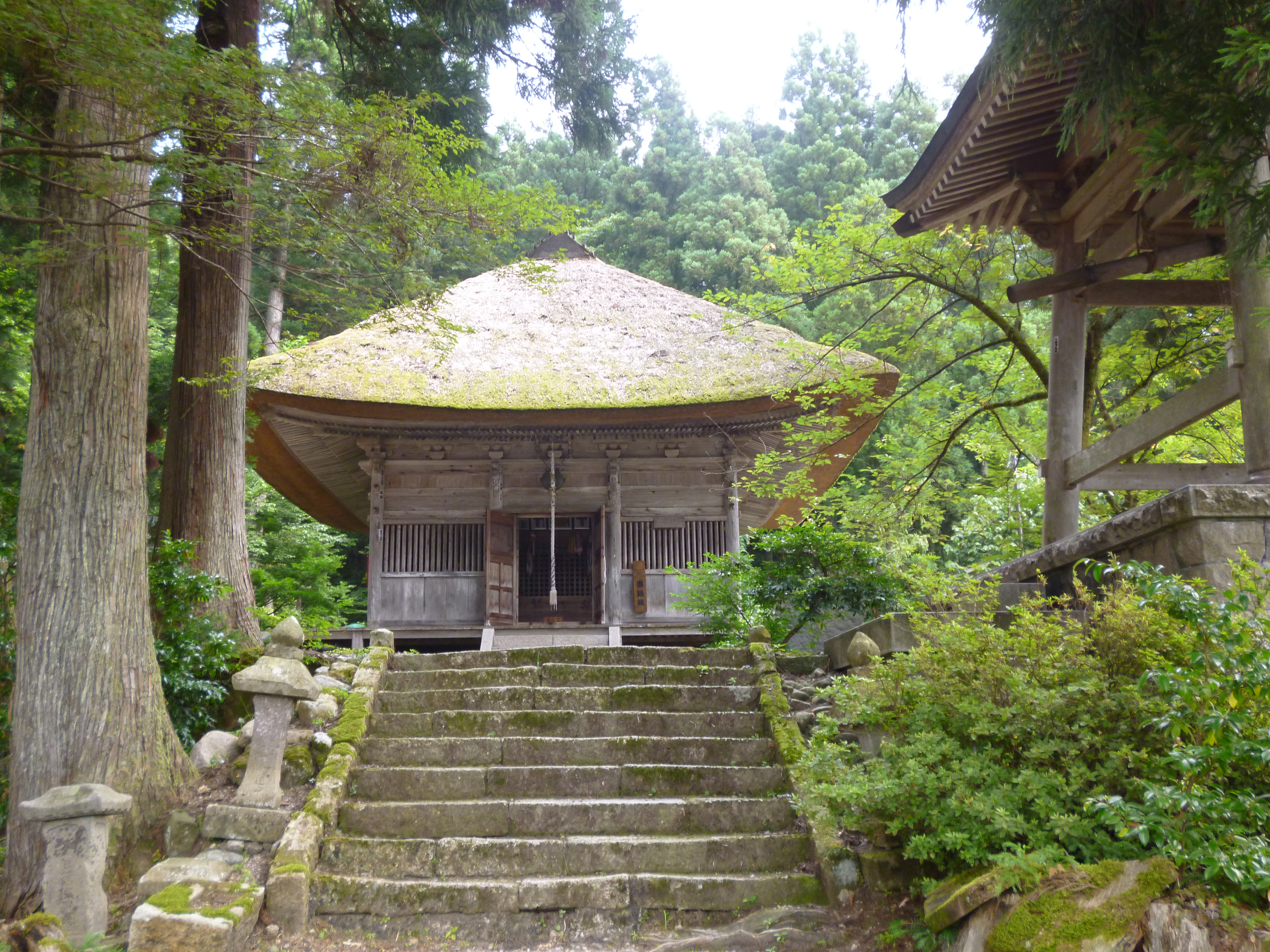 国の重要文化財、平維茂が阿賀野川で金色の小さな薬師如来を見つけ建立したと云われる。